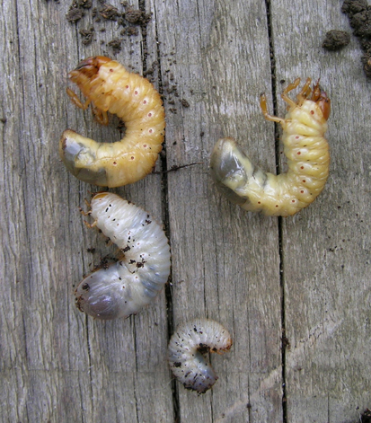 Il est utile de différencier les larves de hannetons (haut) qui se nourrissent de racines, et celles de cétoines (bas) qui ne mangent que des déchets végétaux